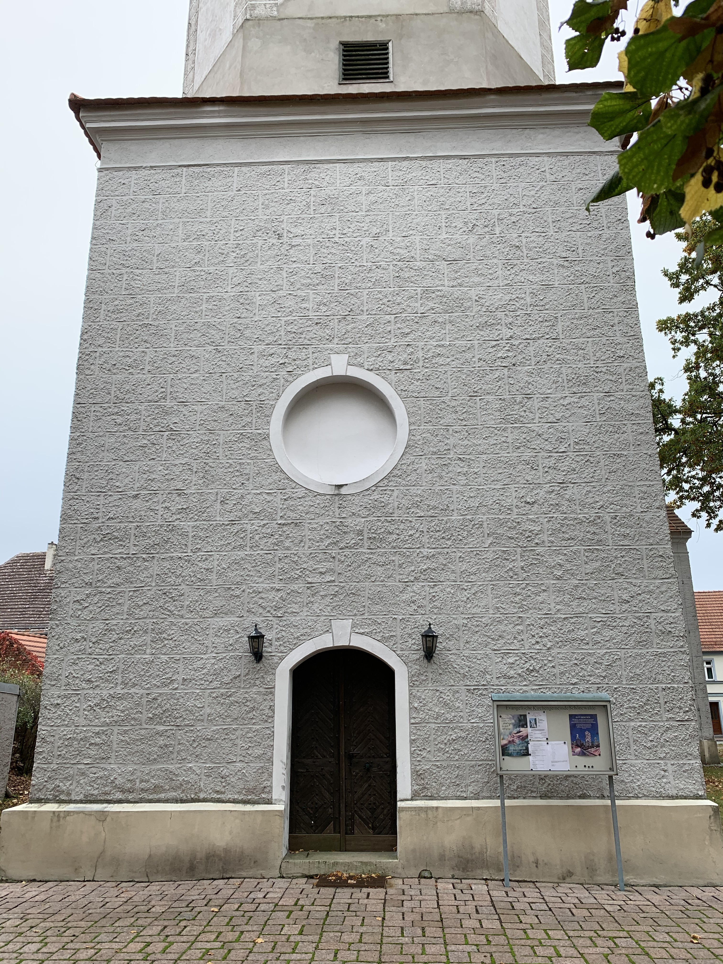 Die Stadtpfarrkirche St. Nikolai ist eine Kreuzkirche in Schönewalde im Landkreis Elbe-Elster in Brandenburg. Die Kirchenausstattung stammt aus der Bauzeit.